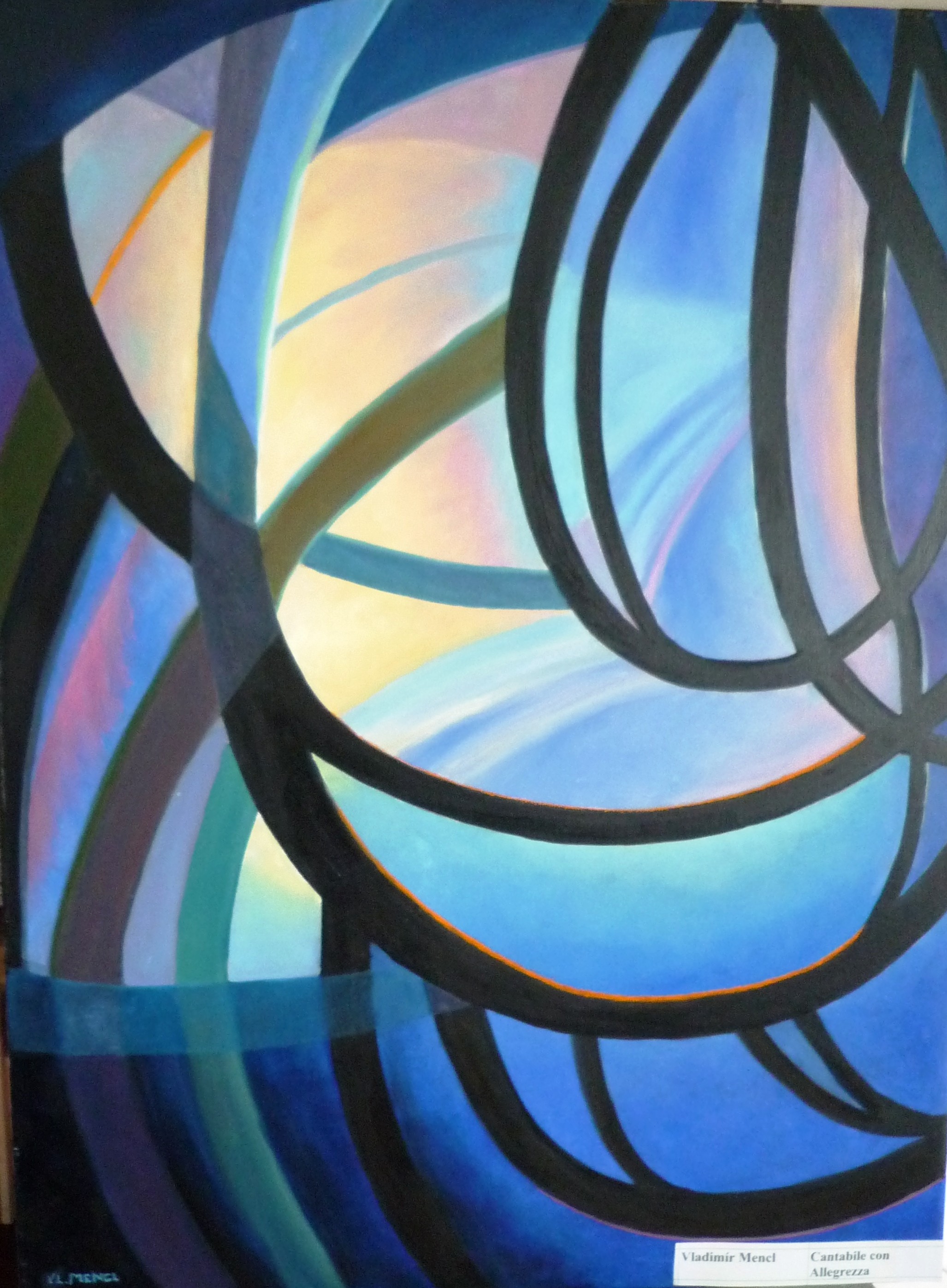 Vladimír Mencl dílo 10